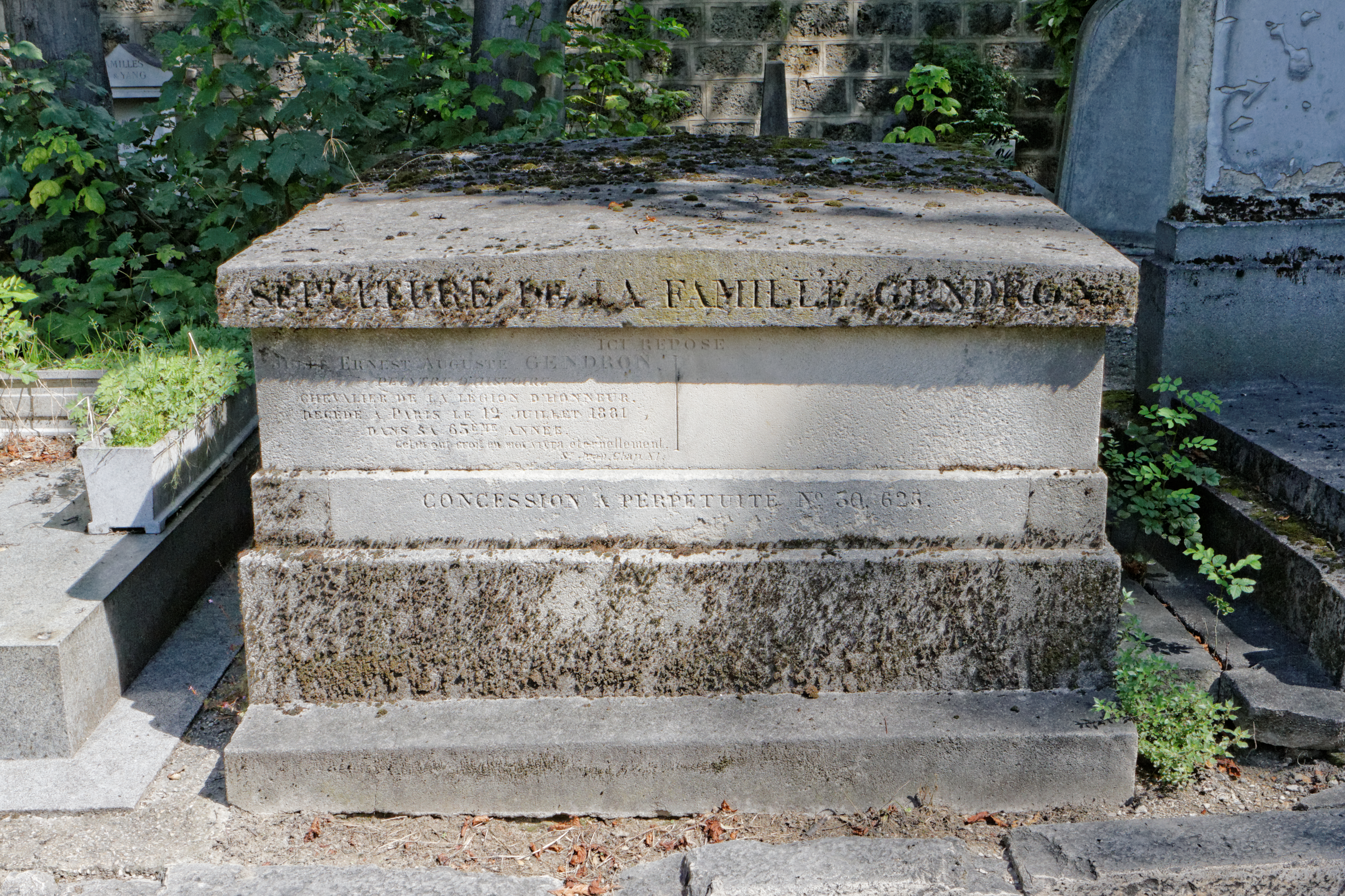 Sépulture du peintre Auguste Gendron (1817-1881).